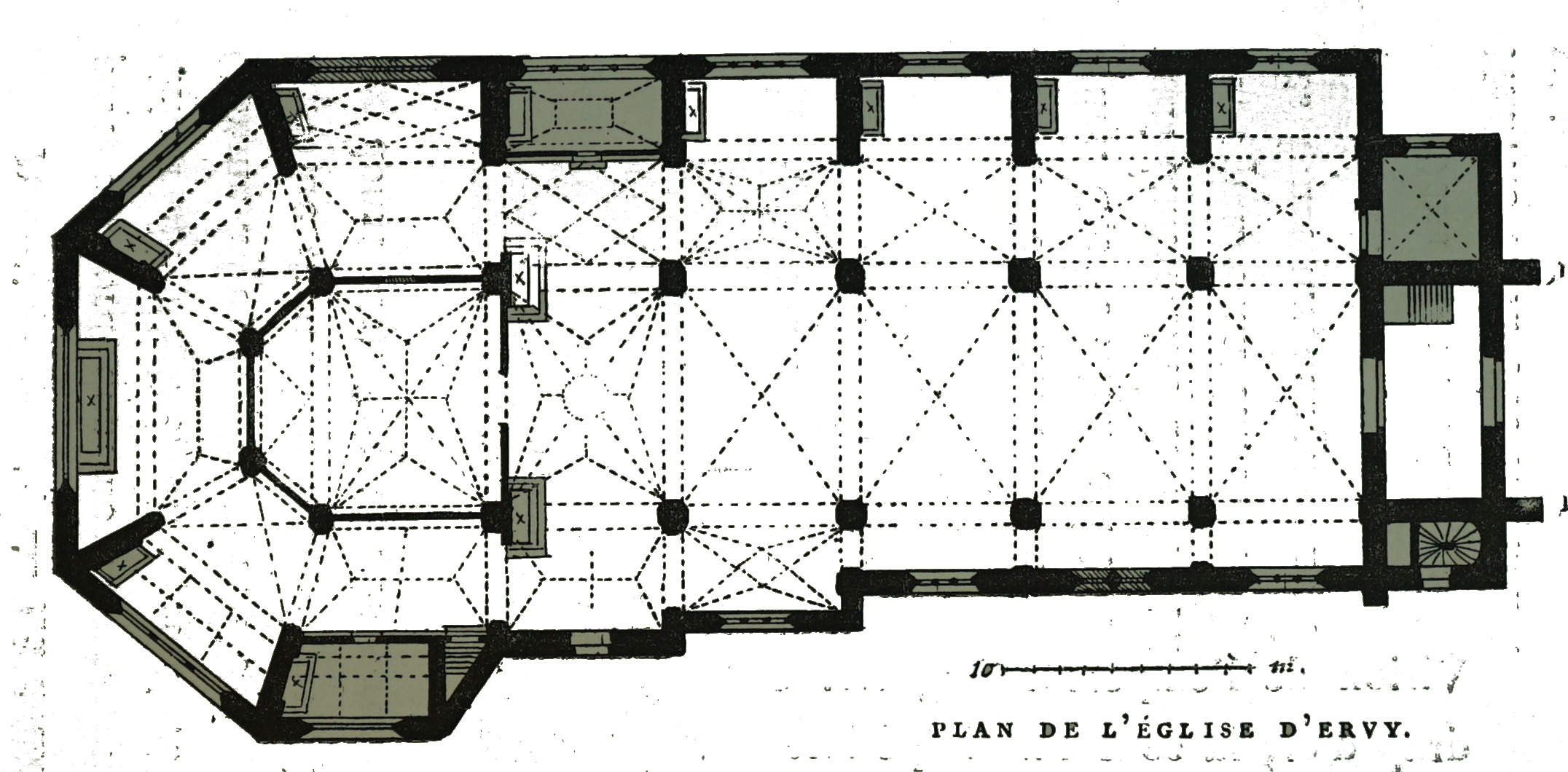 par un dessin d eFichot.